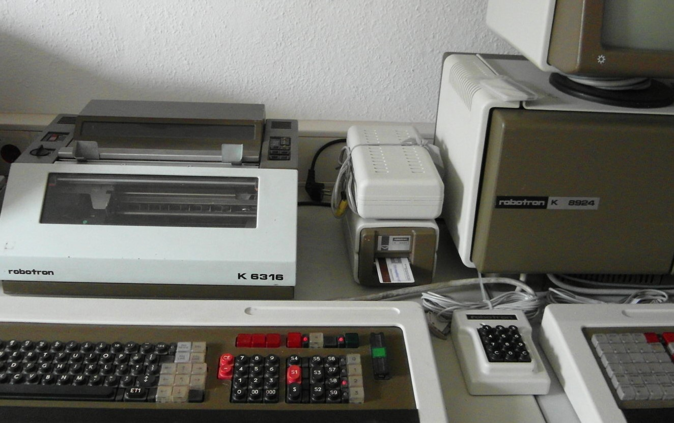 Bankarbeitsplatz robotron mit Geldkartenleser (Mitte) und kleiner Tastatur für Geheimzahl